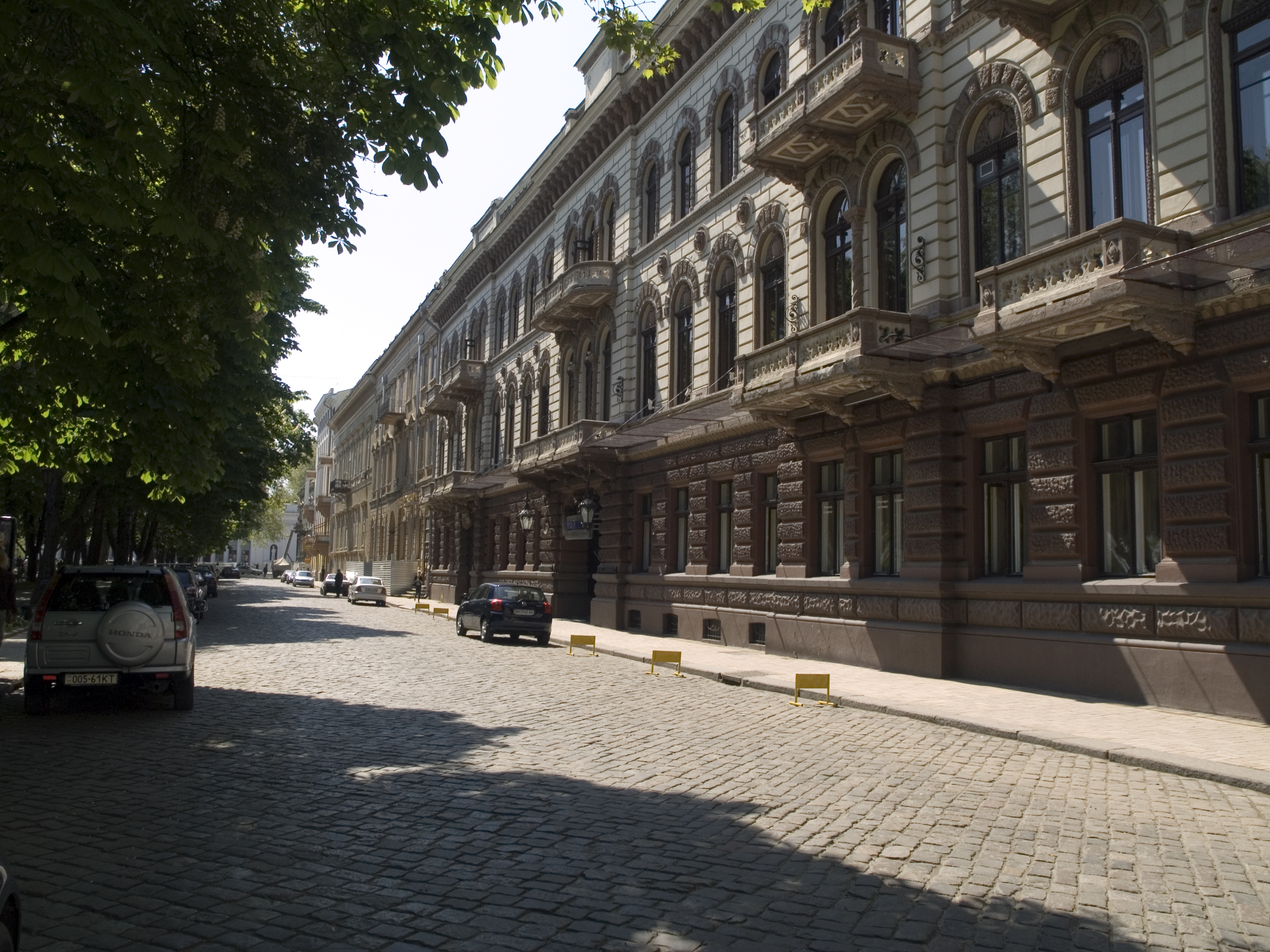 Україна, Одеса - Приморський бульвар, 11 - Будинок Зонтага в якому у серпні 1837 р. жив Жуковський В.- поет